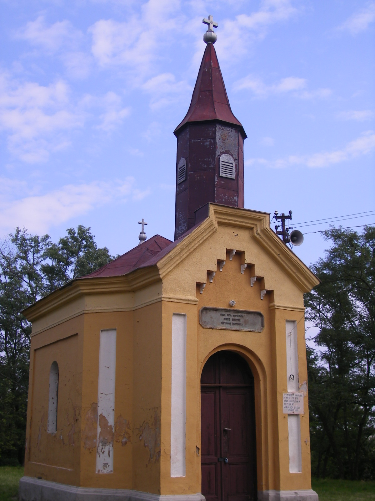 Udvard - kápolna a Kálvárián